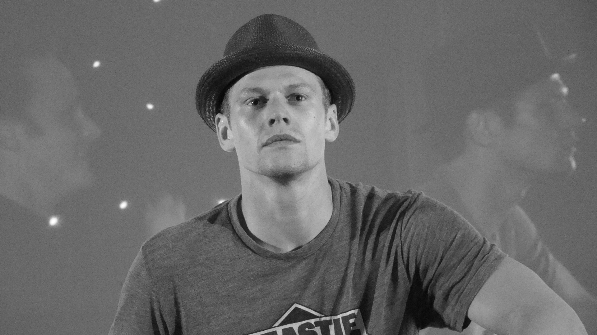 Zach Roerig